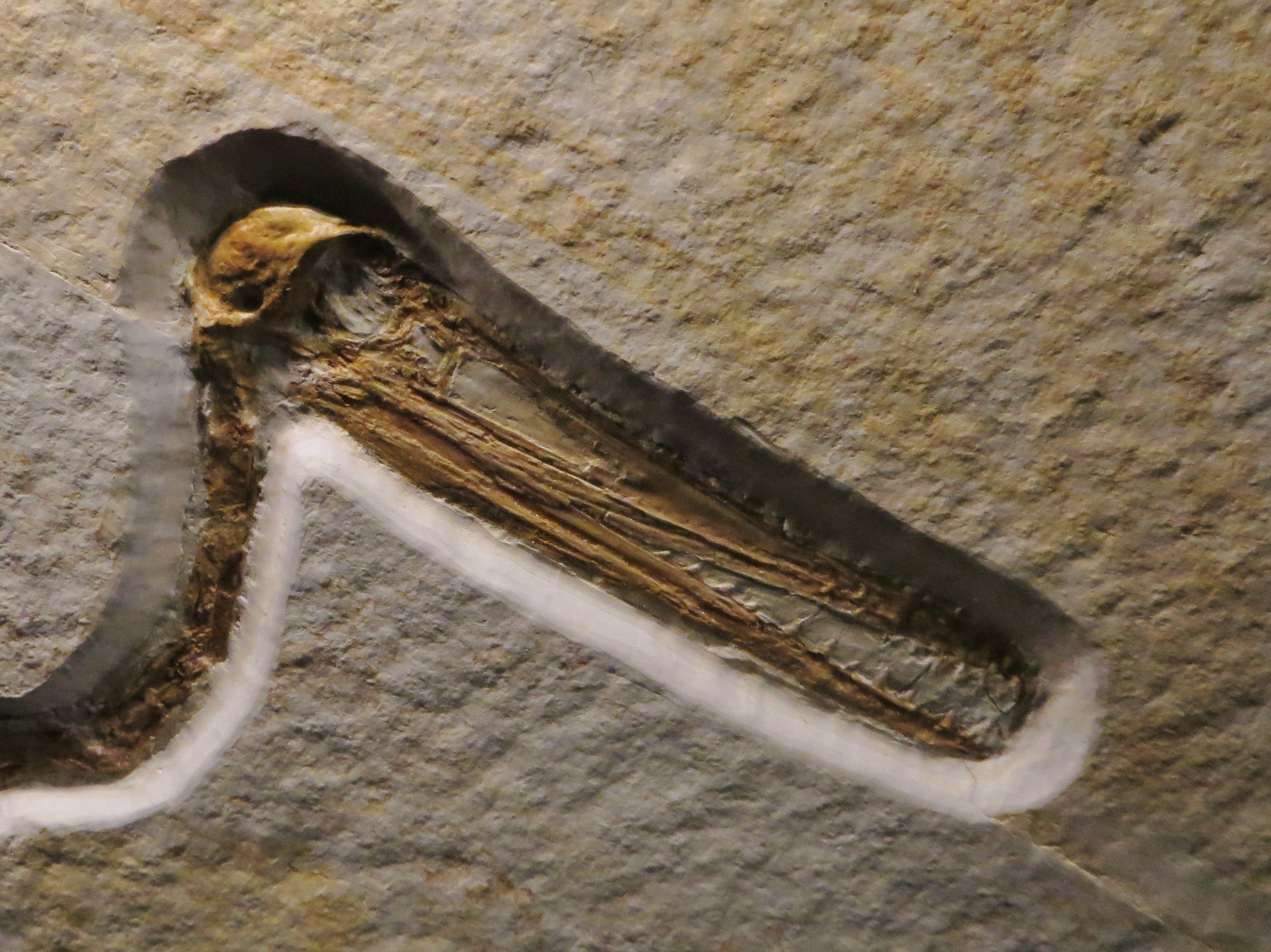 Fossil - Took the picture at Musee des Confluences, Lyon